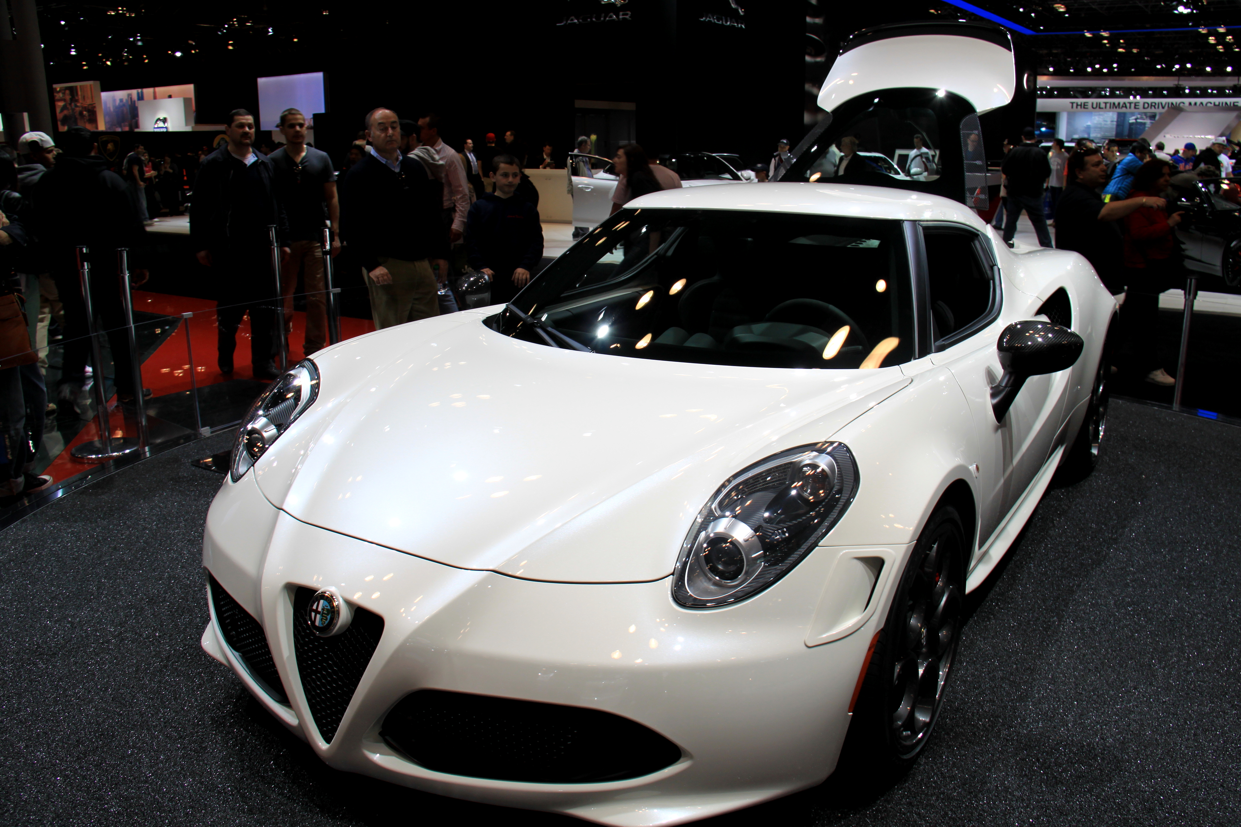 Alfa Romeo 4C Coupé per il mercato nord americano produzione: MODENA - ITALIA esposizione: Salone Internazionale dell'automobile di New York 2014